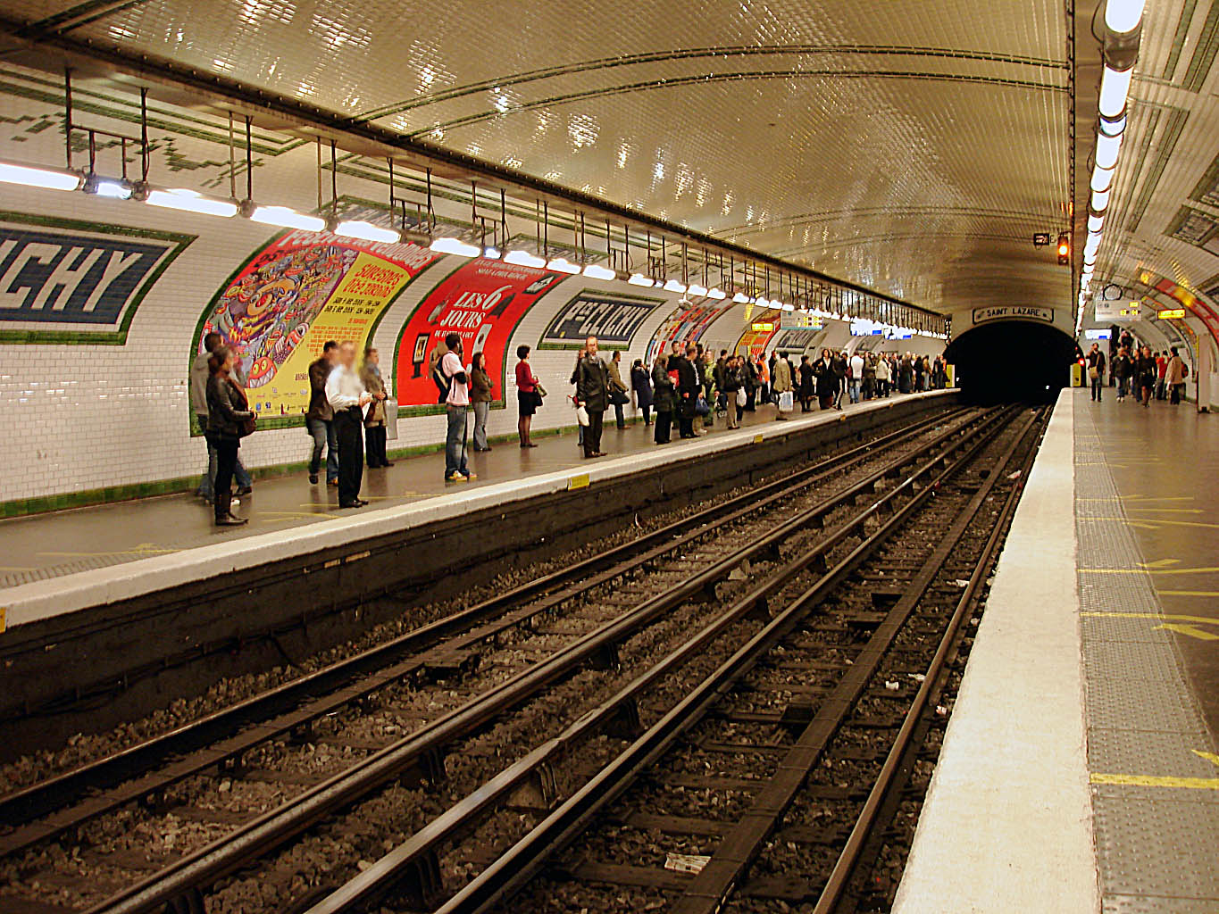 Station Place de Clichy de la ligne 13 du métro de Paris, France.